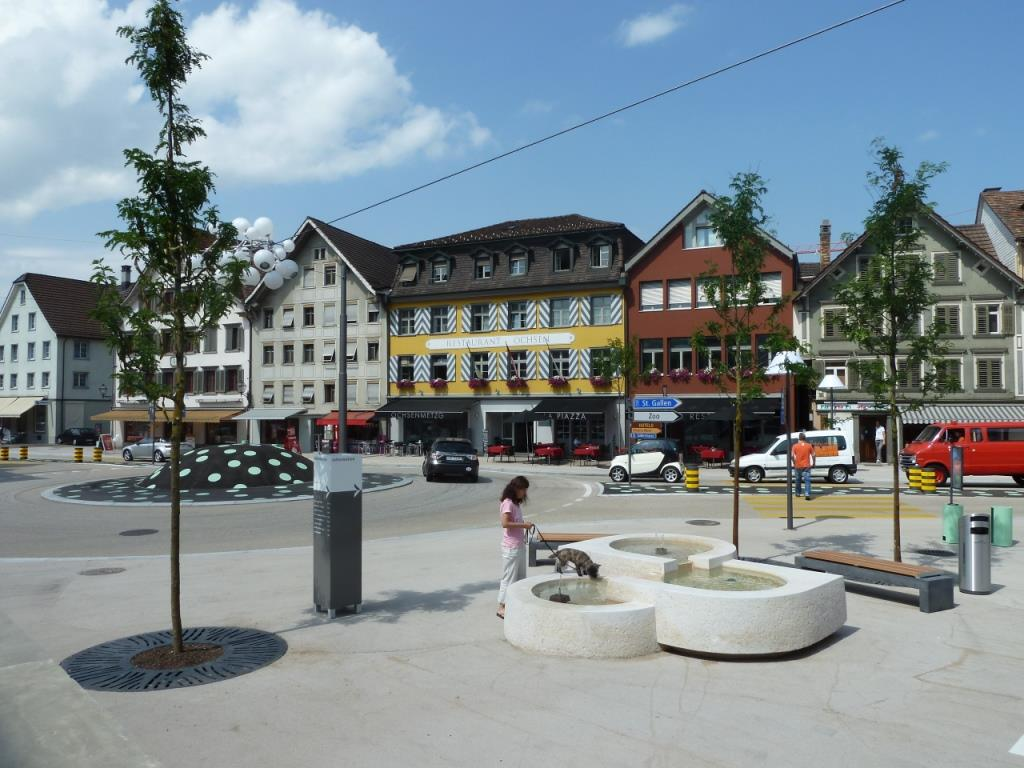 Das Gossauer Stadtzentrum wurde 2012 umgestaltet.